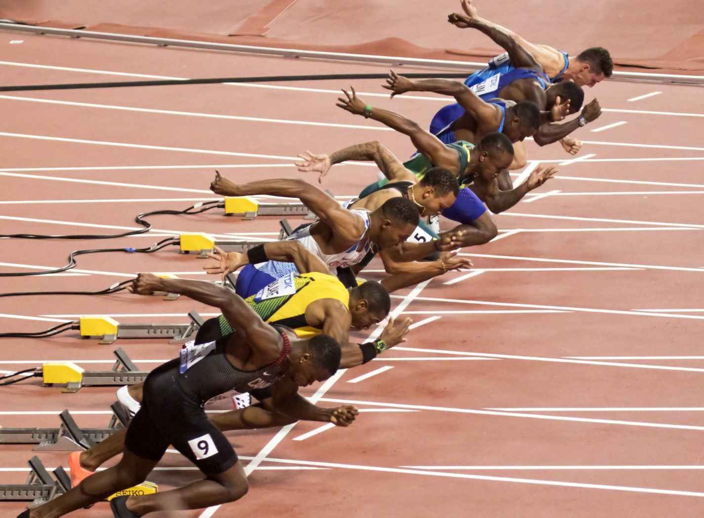 DOH20288 100m final men